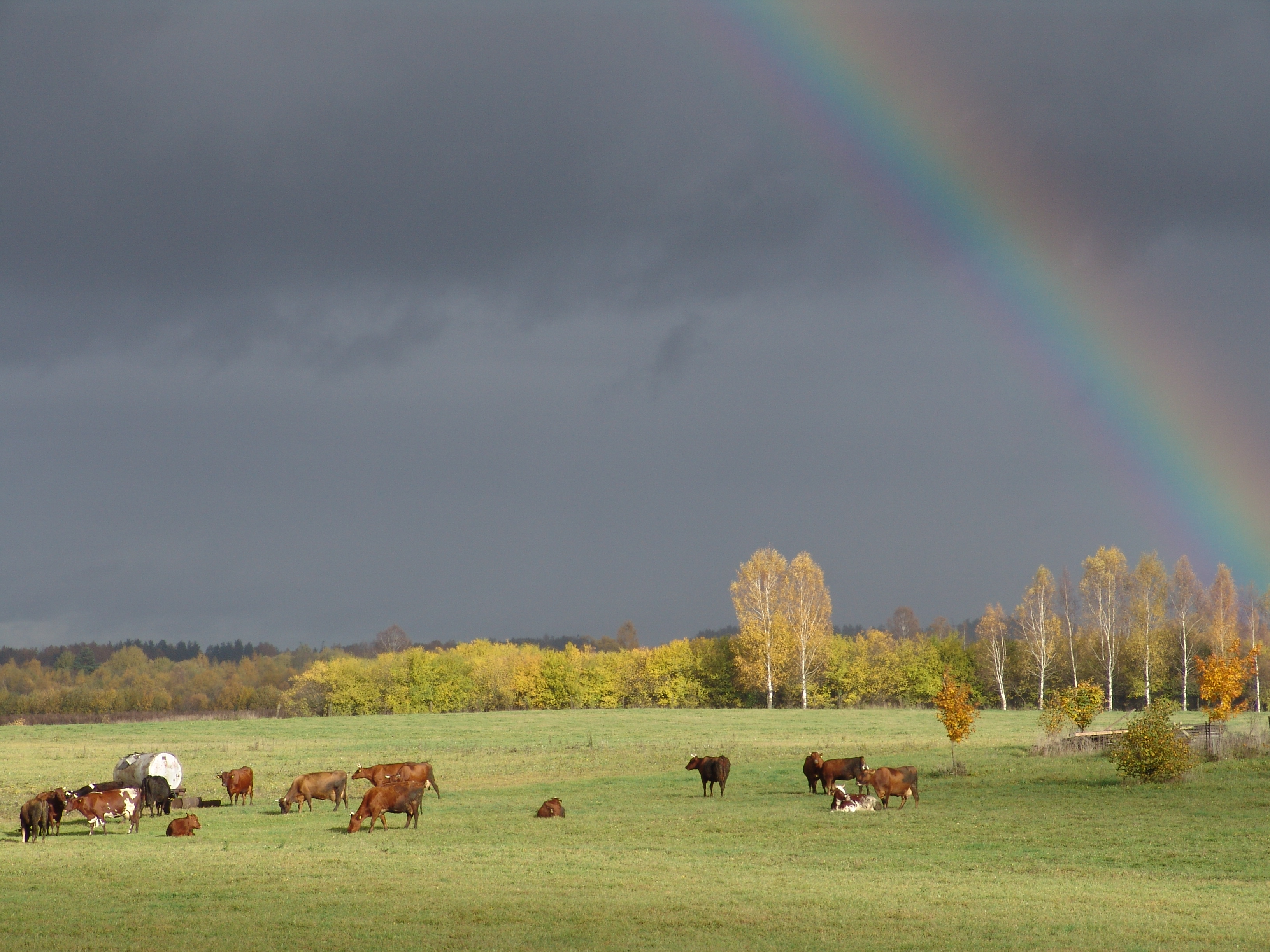 Piensaimniecība